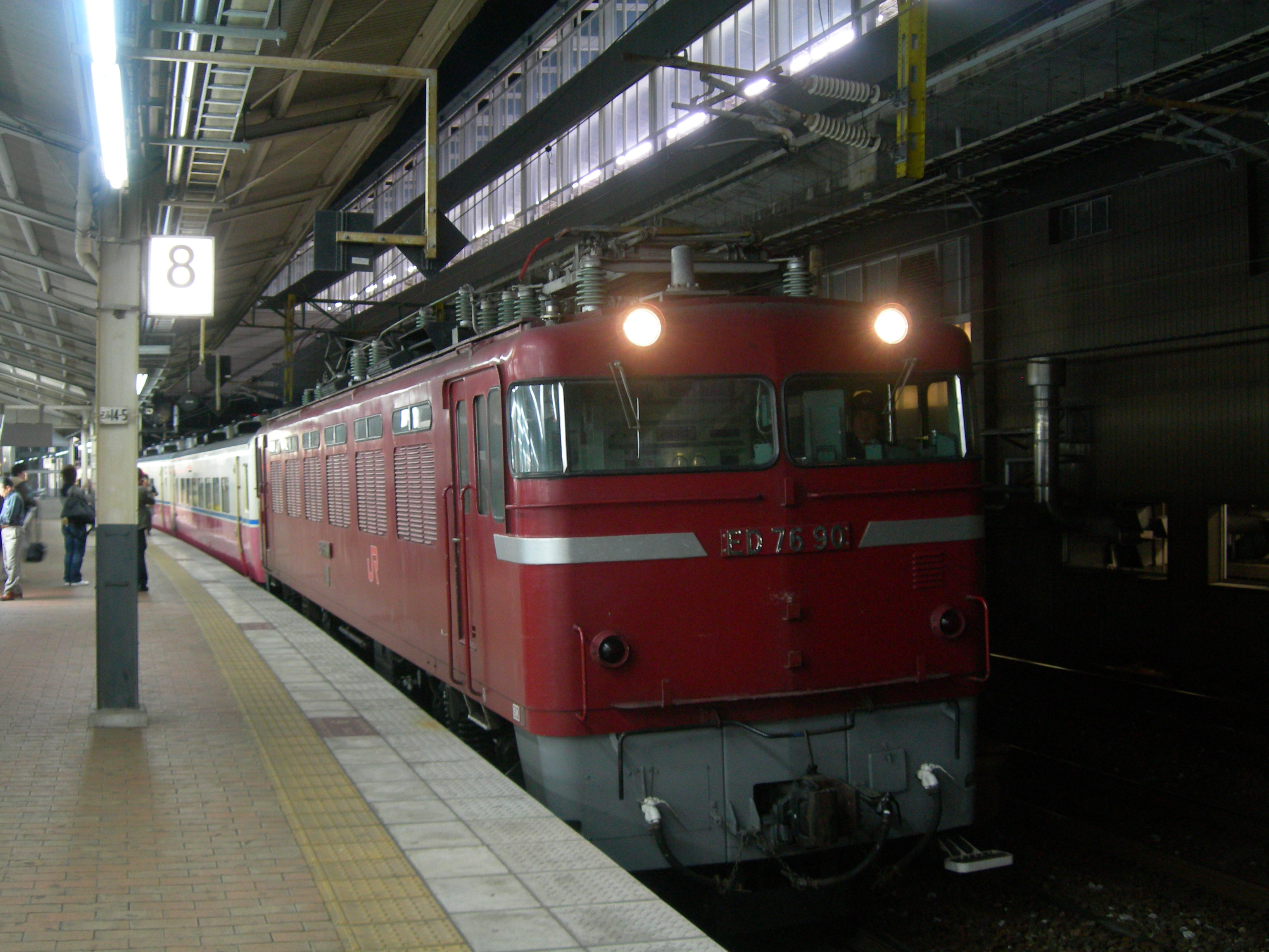 ムーンライト九州 ED76-90